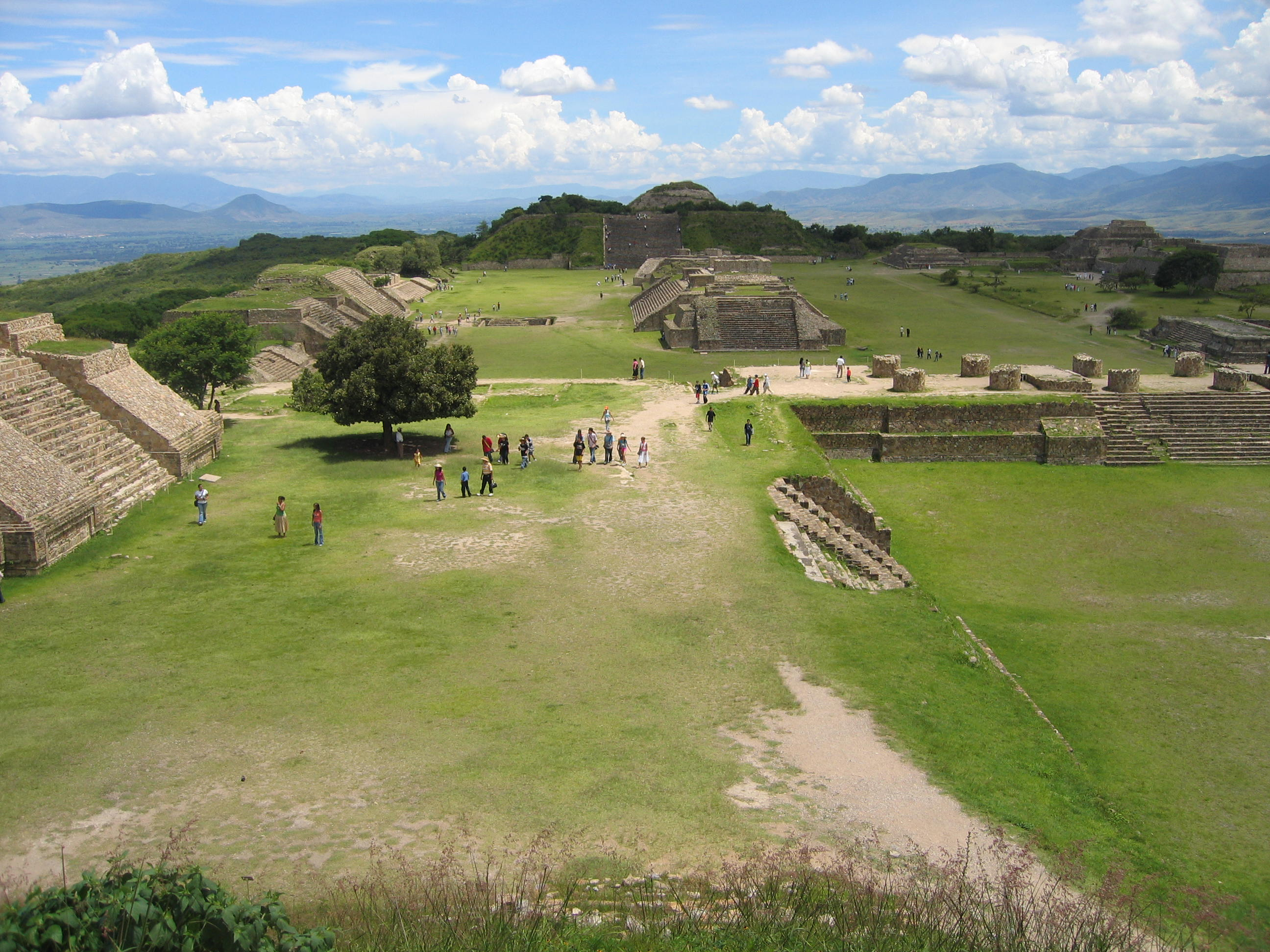 Monte Alban (Oaxaca Mexico), August 2006